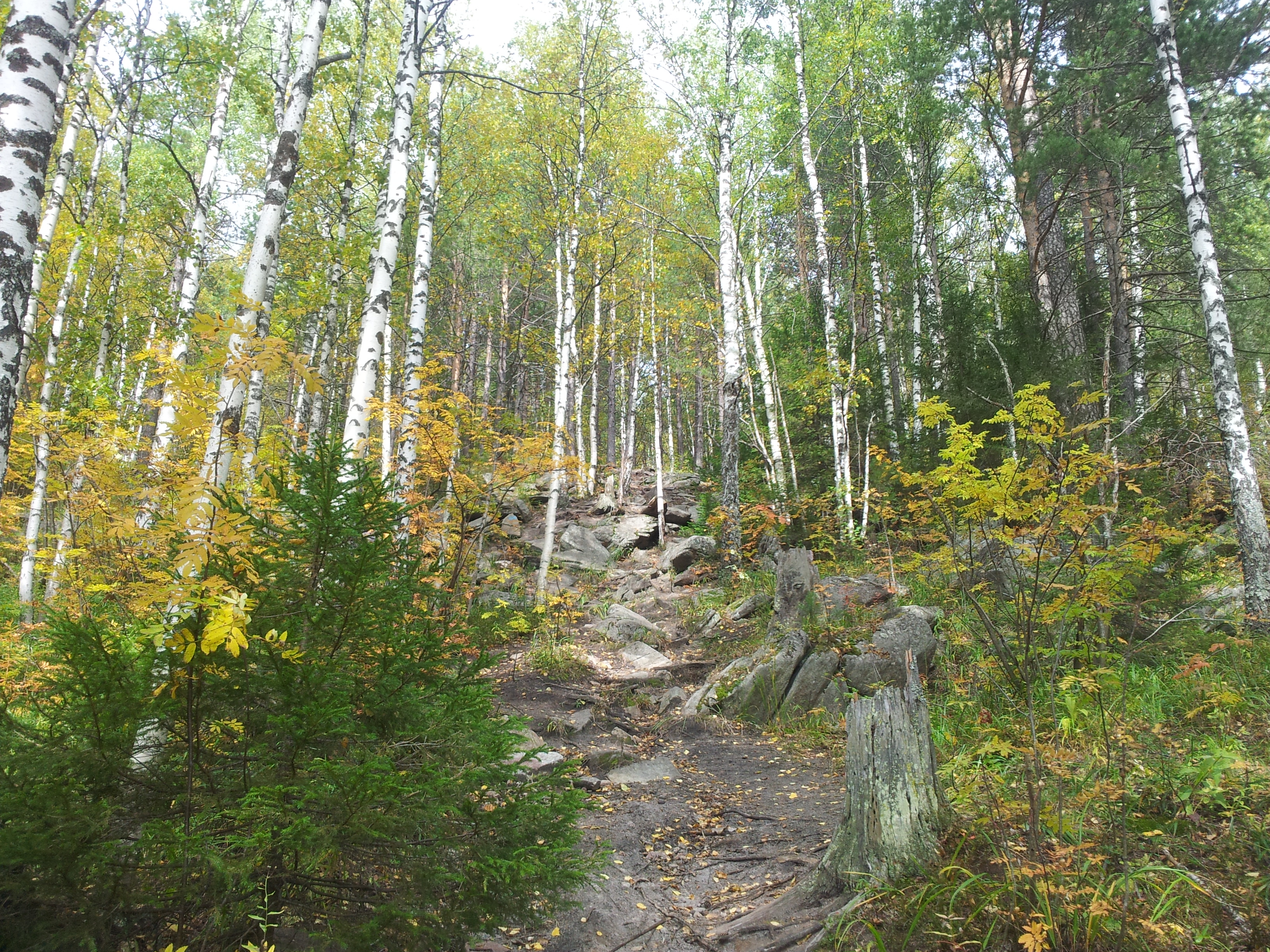 Vegetation am Südhang des Dwuglawaja Sopka im Nationalpark Taganai